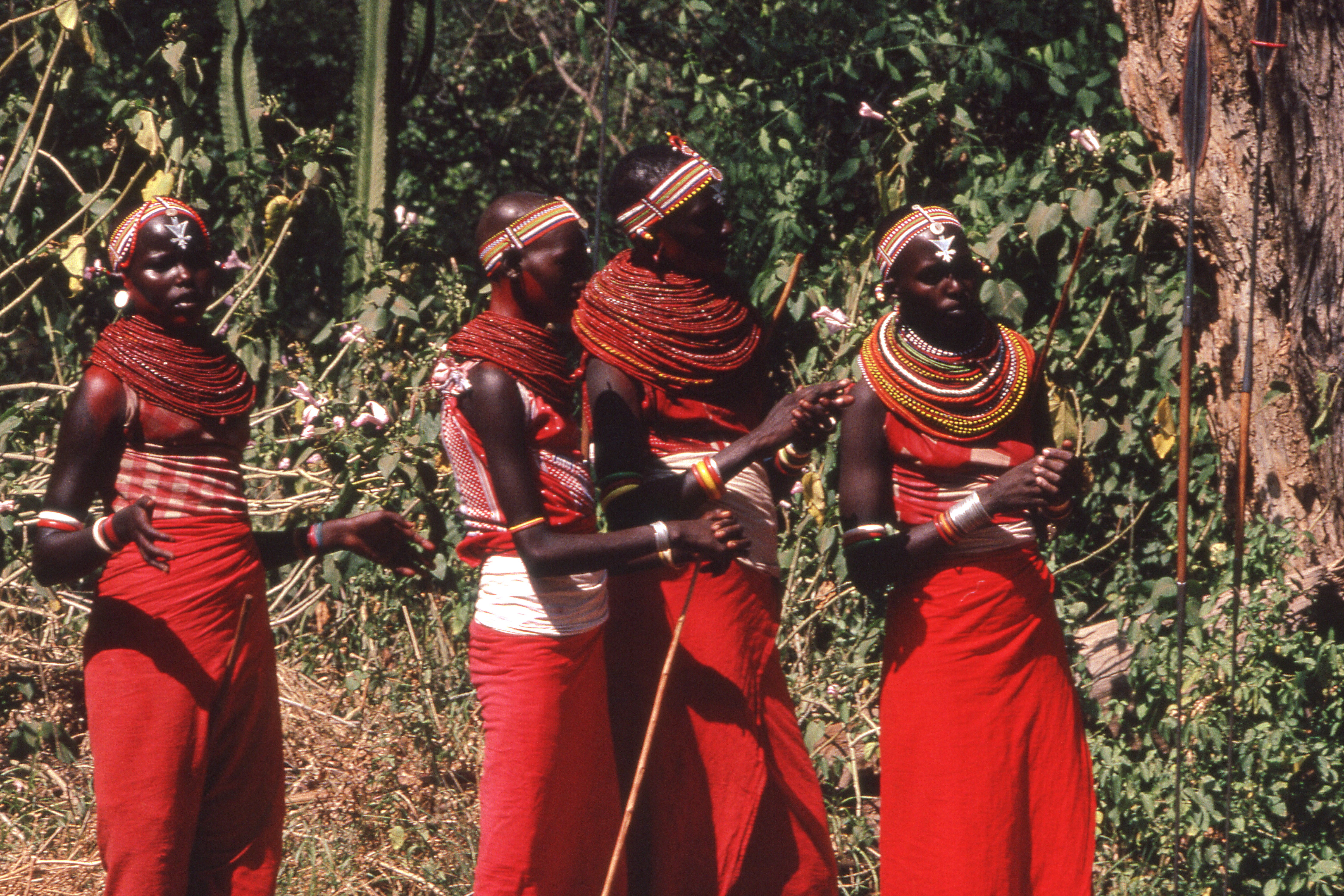 MAASAI_07.jpg LEICA R3 180MM APOCHOMATIQUE